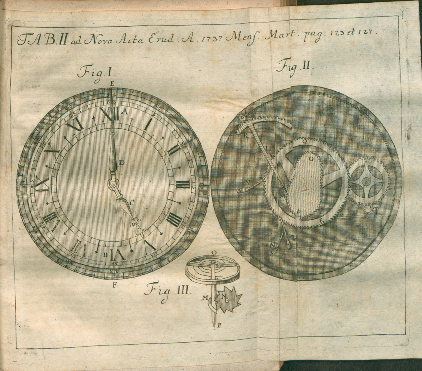 Illustration